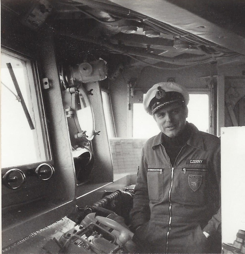 Fregattenkapitän Dieter Czerny als Kommandant auf der Brücke des Zerstörers Mölders (D 186).